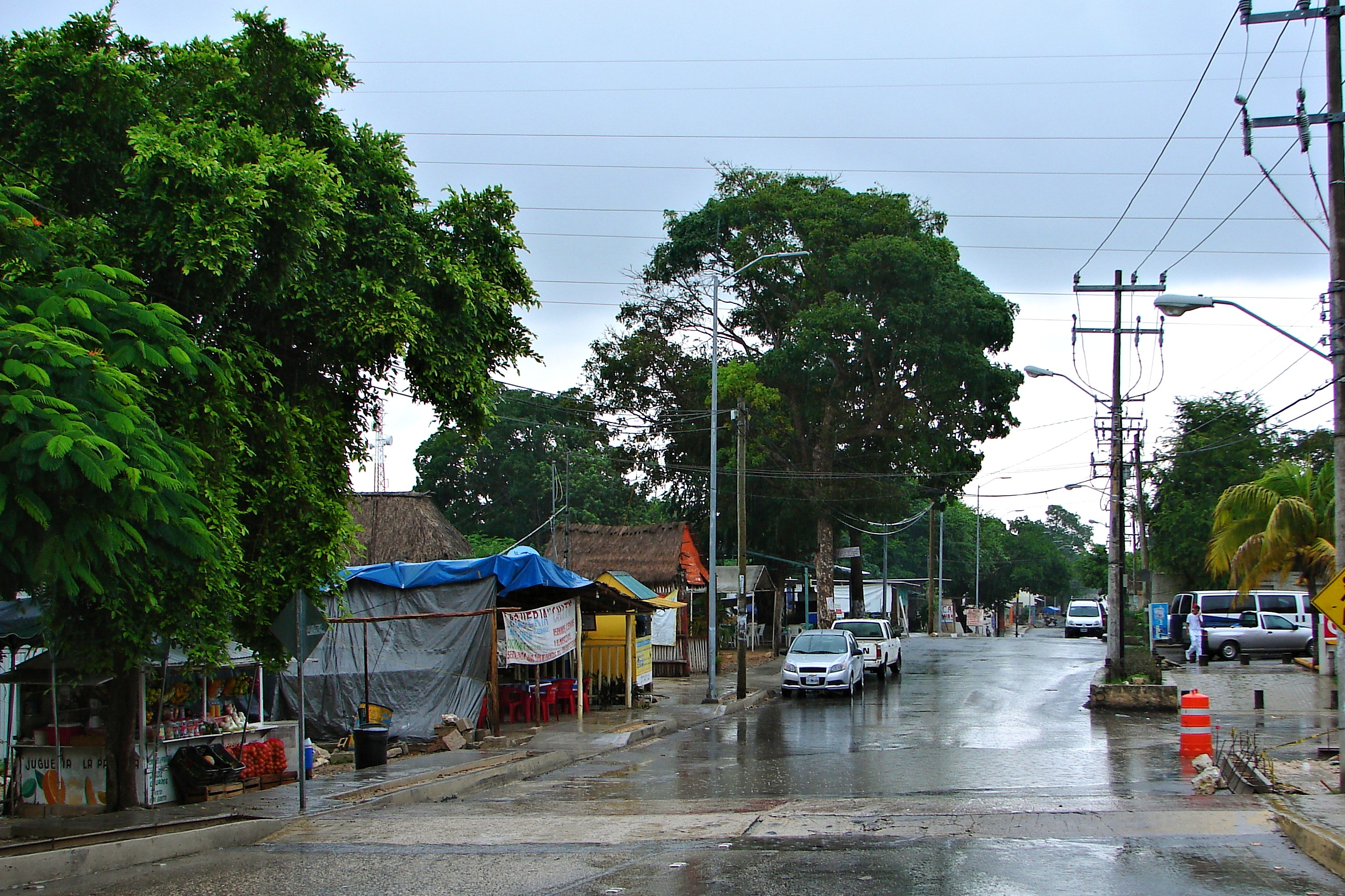 Puerto Aventuras pueblo (inland village), Quintana Roo, Mexico